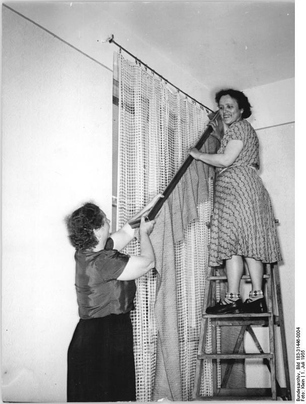 Aufhängen von Gardinen Zentralbild Klein 4 Motive 1.7.1955 Bereits bezogen wurden die ersten 20 Wohnungen, die im Arbeiterwohnungsbauprogramm in Berlin fertiggestellt wurden. Sie gehören der Arbeiterwohnungsbaugenossenschaft des Funkwerkes Köpenick und entstanden in der Seelenbinderstrasse in Berlin-Köpenick. UBz: Nur noch die Gardinen aufstecken und die 2-Zimmerwohnung der Kollegin Eggebrecht, Montiererin im Funkwerk Köpenick (auf der Leiter) ist eingerichtet.